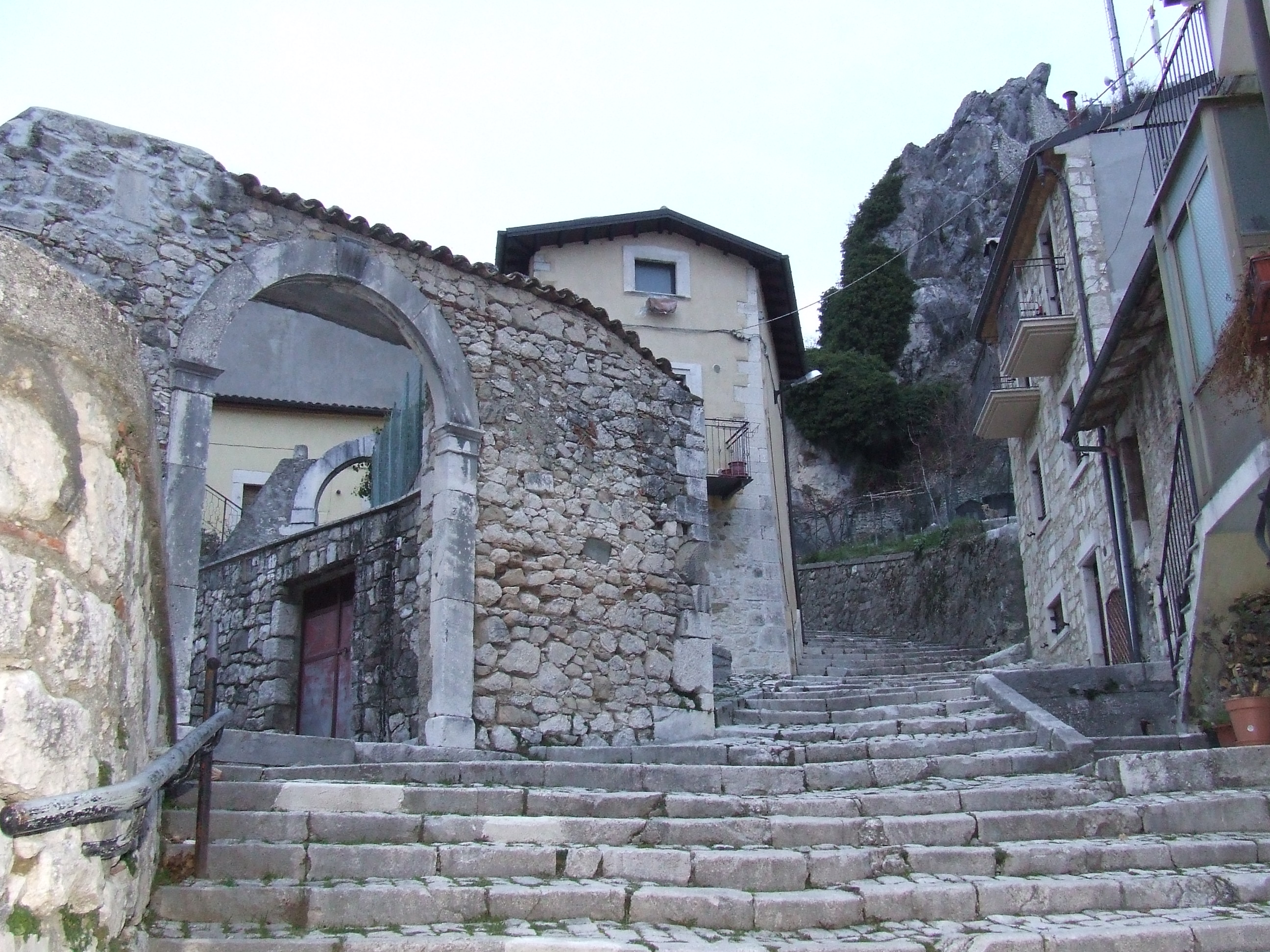 Castel di Sangro - scorcio del centro storico